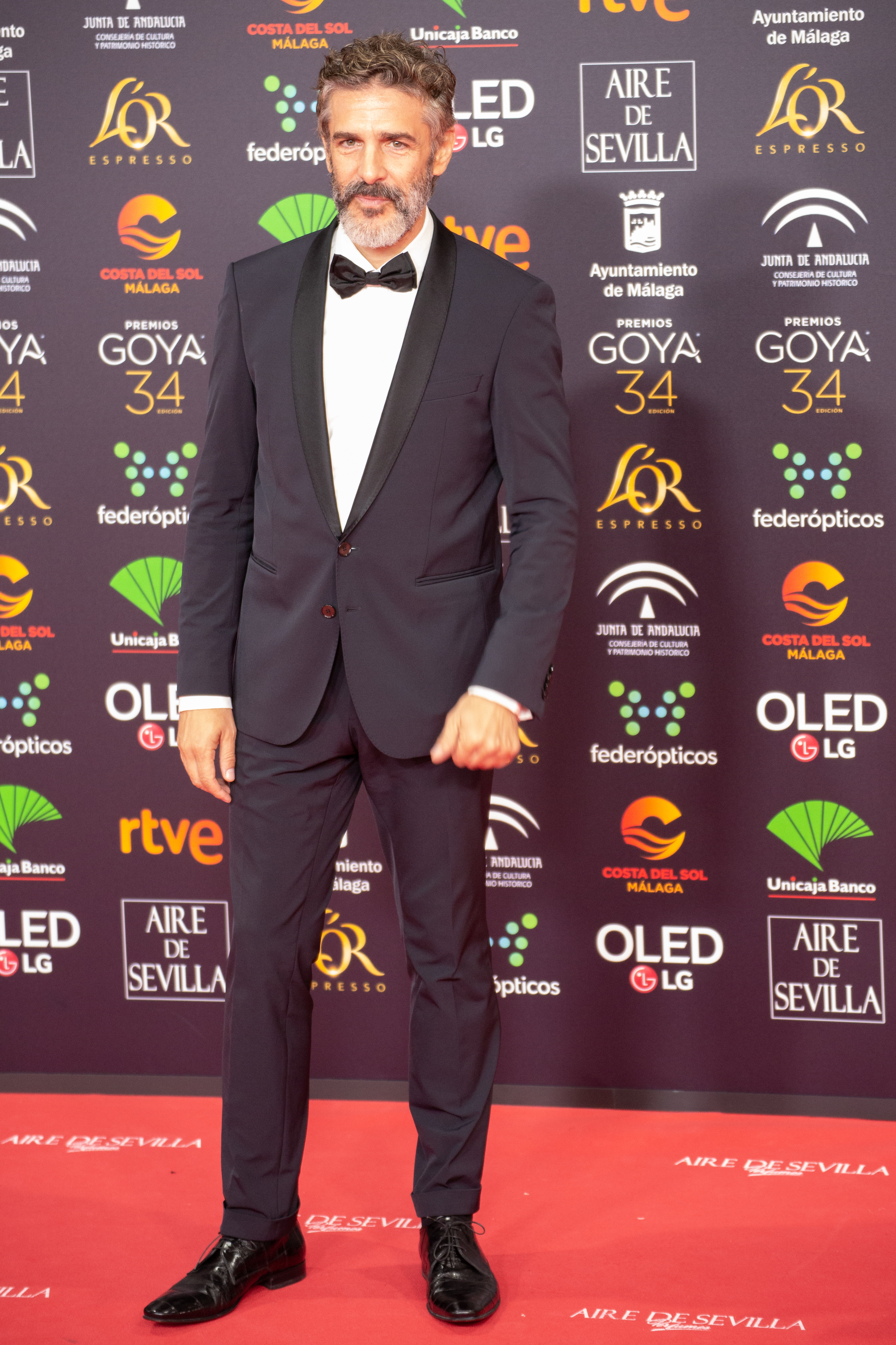 Leonardo Sbaraglia en la alfombra roja de la ceremonia de entrega de los Premios Goya 2020, celebrados en Málaga